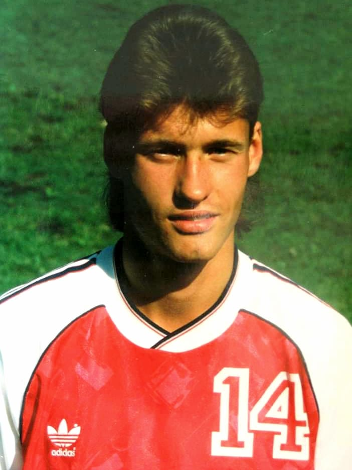 Budapest Honvéd (junior klub)